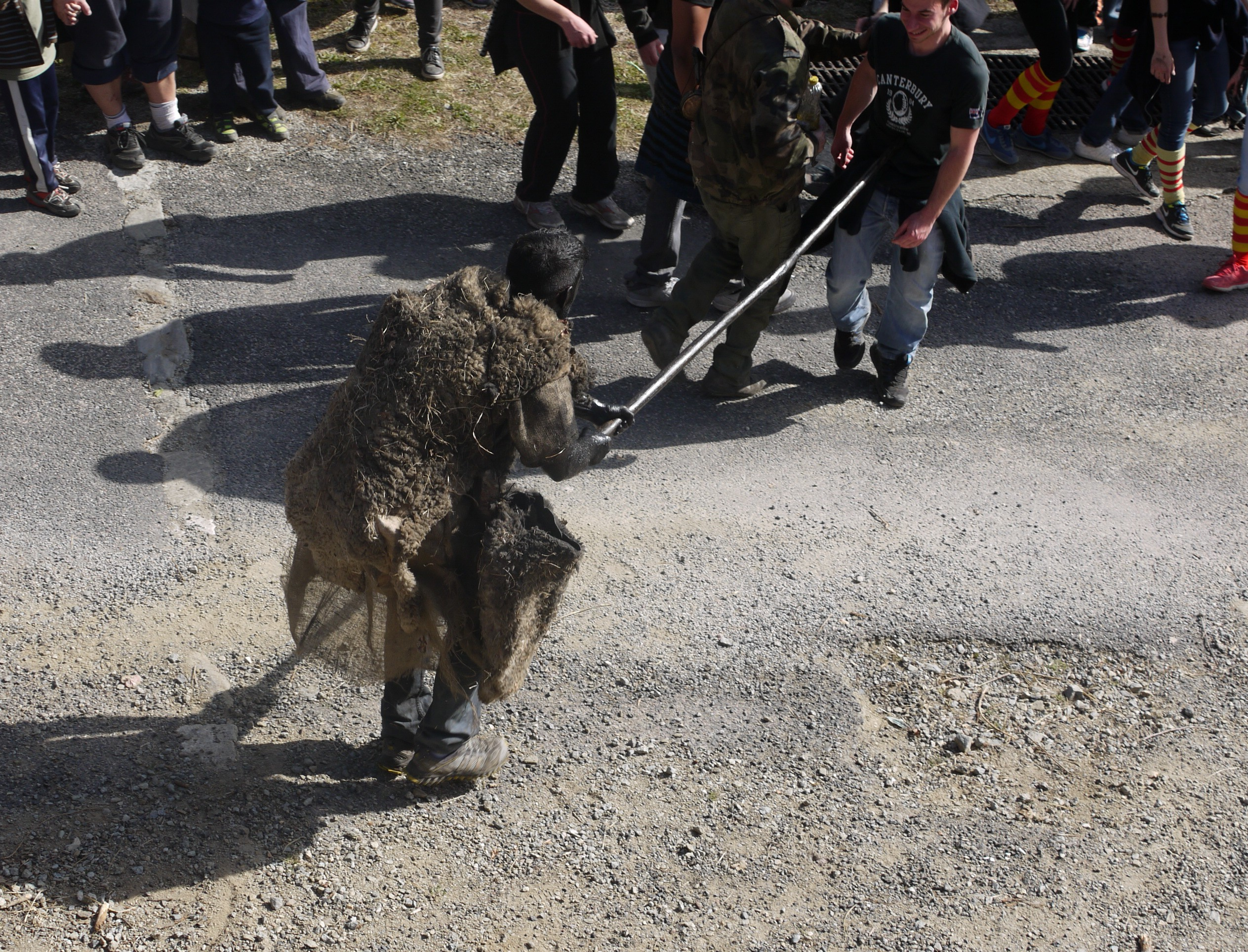 Fête de l'ours à Prats-de-Mollo en 2016